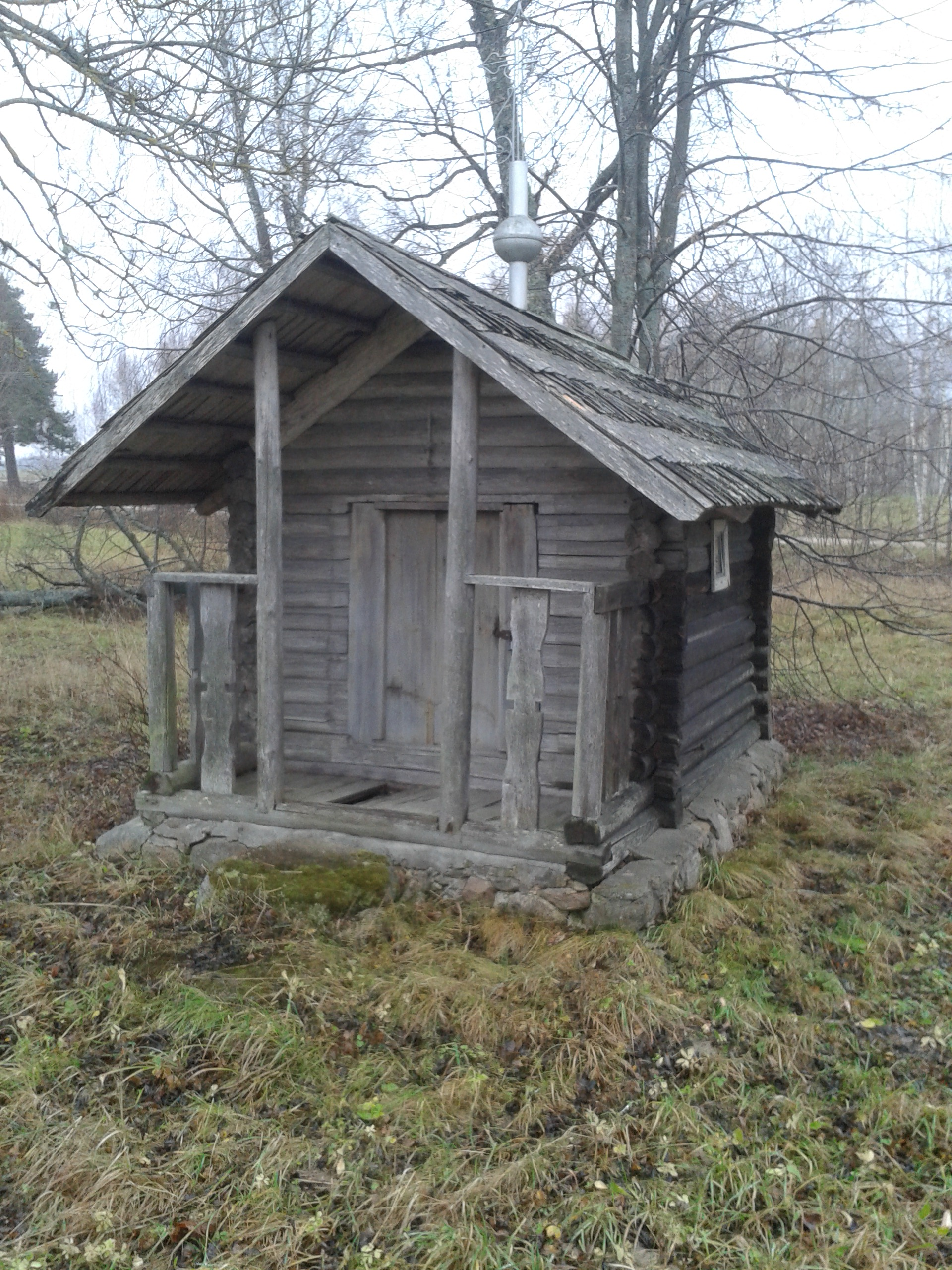 Meldova tsässon